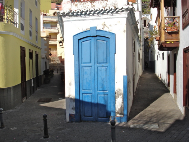 Construcciones tradicionales en el barrio de La Esquina en Tazacorte, La Palma, Canarias